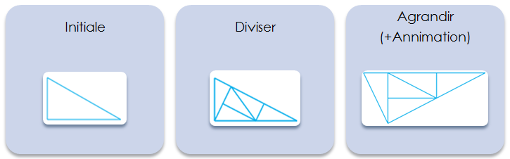 Differentes etapes du fractale